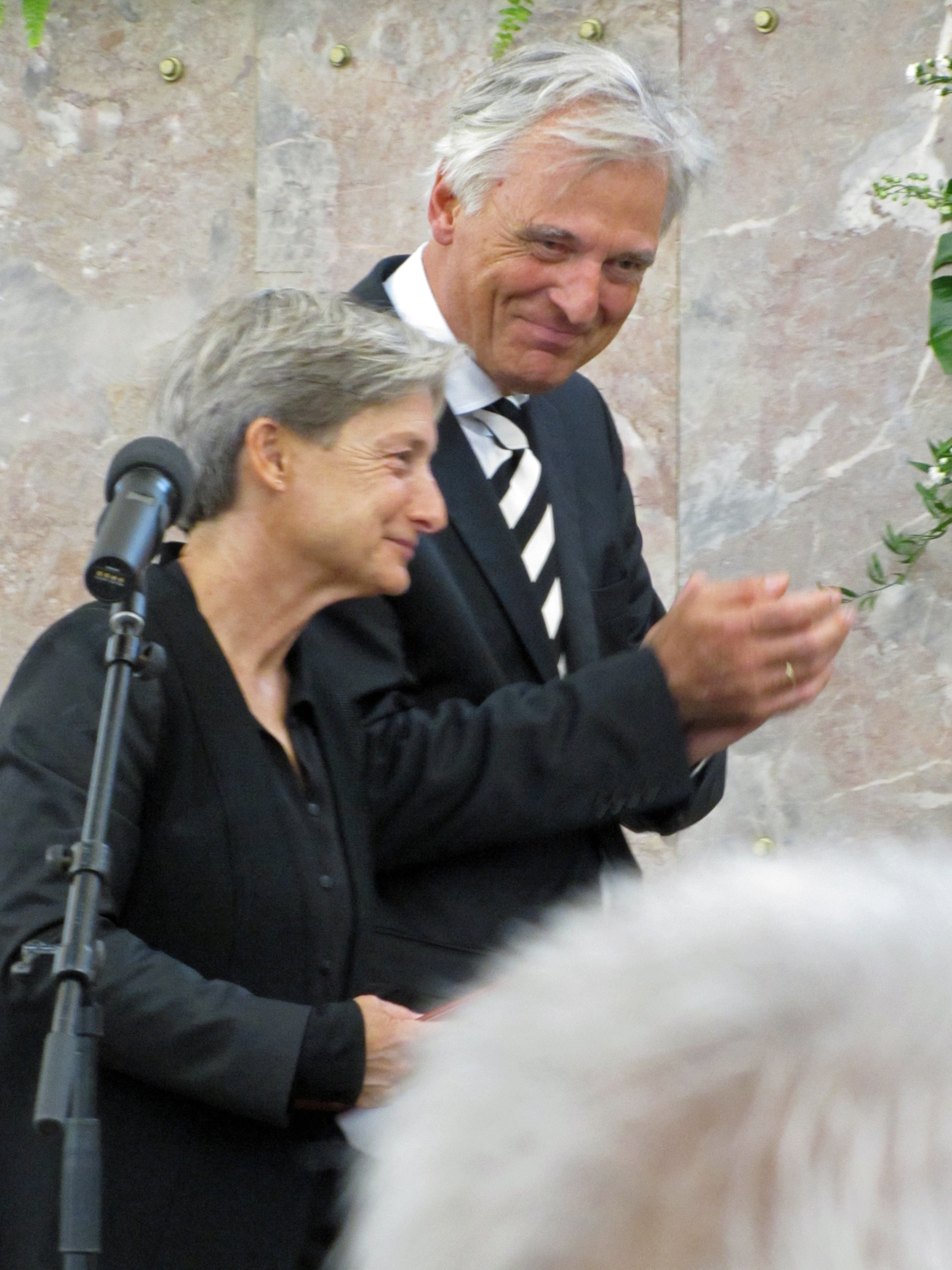 Adorno-Preis 2012. Judith Butler und Felix Semmelroth, in der Frankfurter Paulskirche.